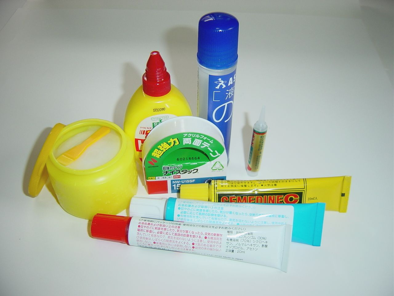 Adhesives